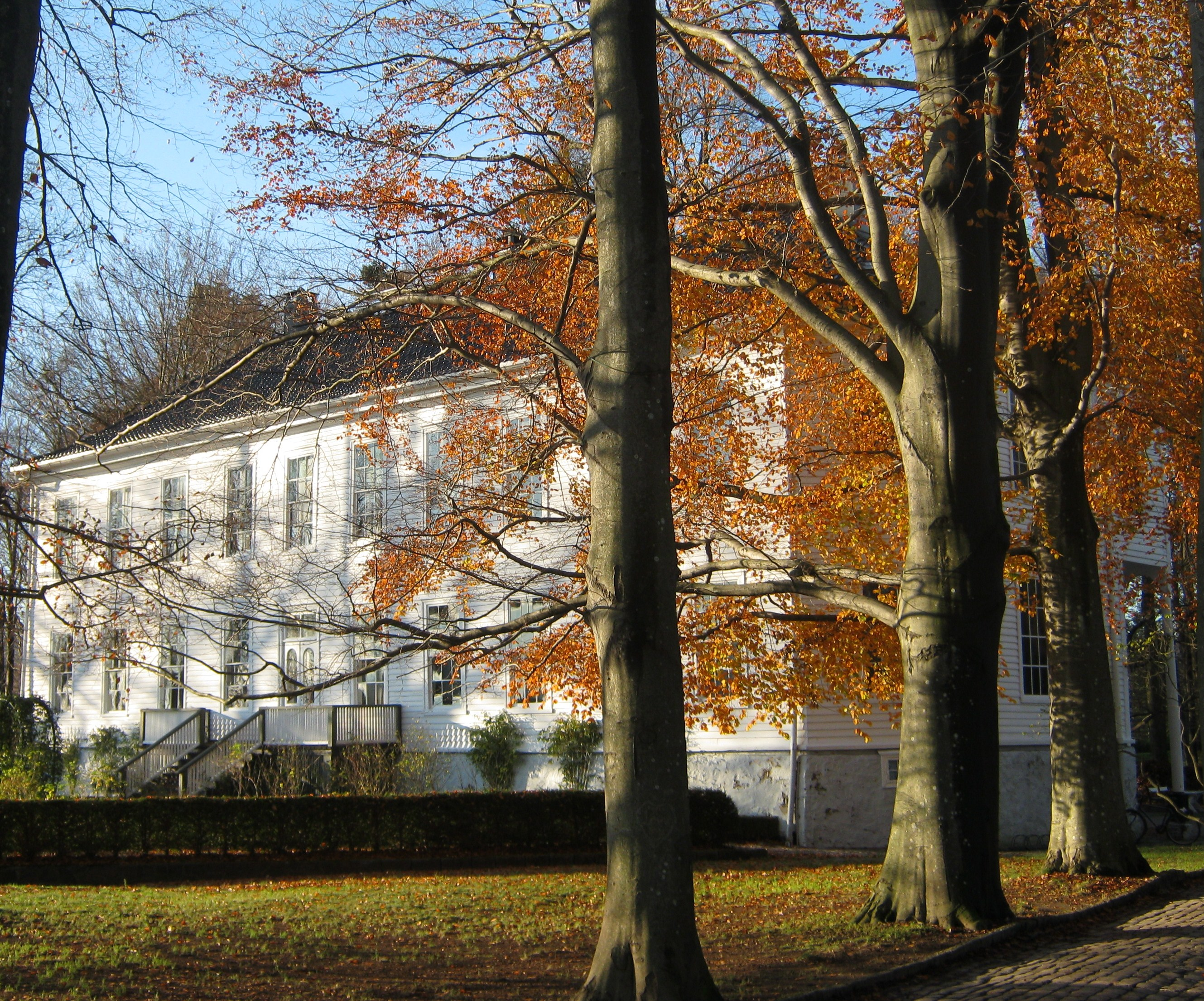 Gimle gård i Kristiansand